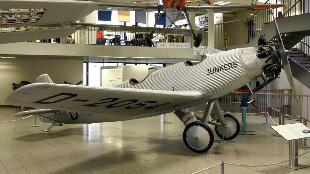 Junkers A50 im Deutschen Museum